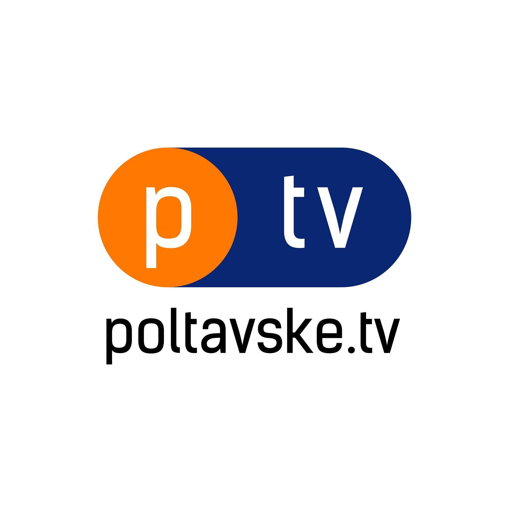 Логотип телеканалу PTV